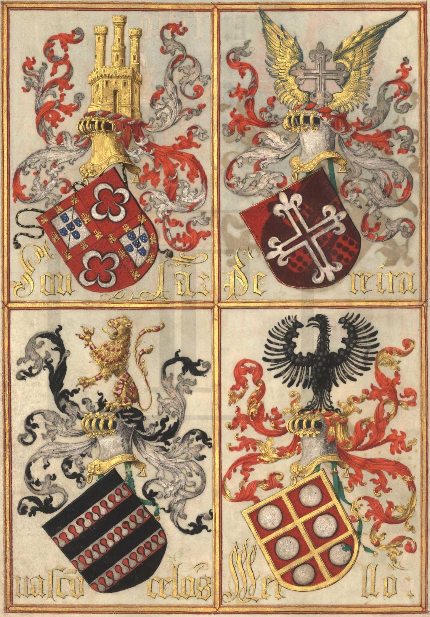 Livro da Nobreza e Perfeiçam das Armas (fl 10v)